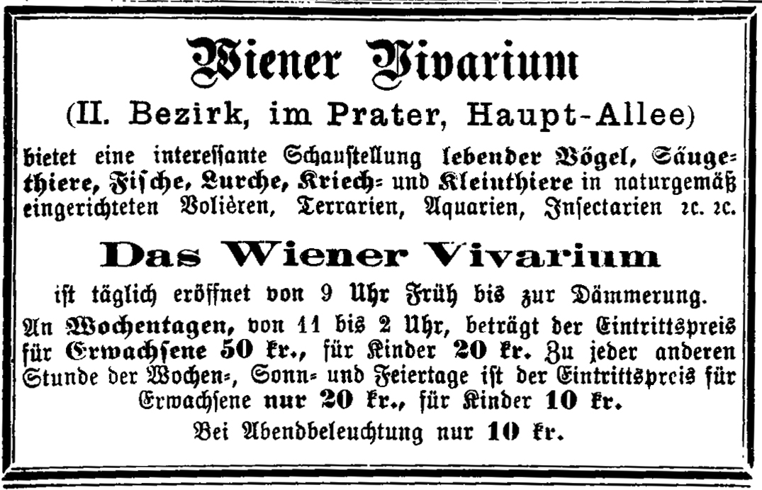 Wiener Vivarium, Annonce in Kikeriki (1888-08-19)